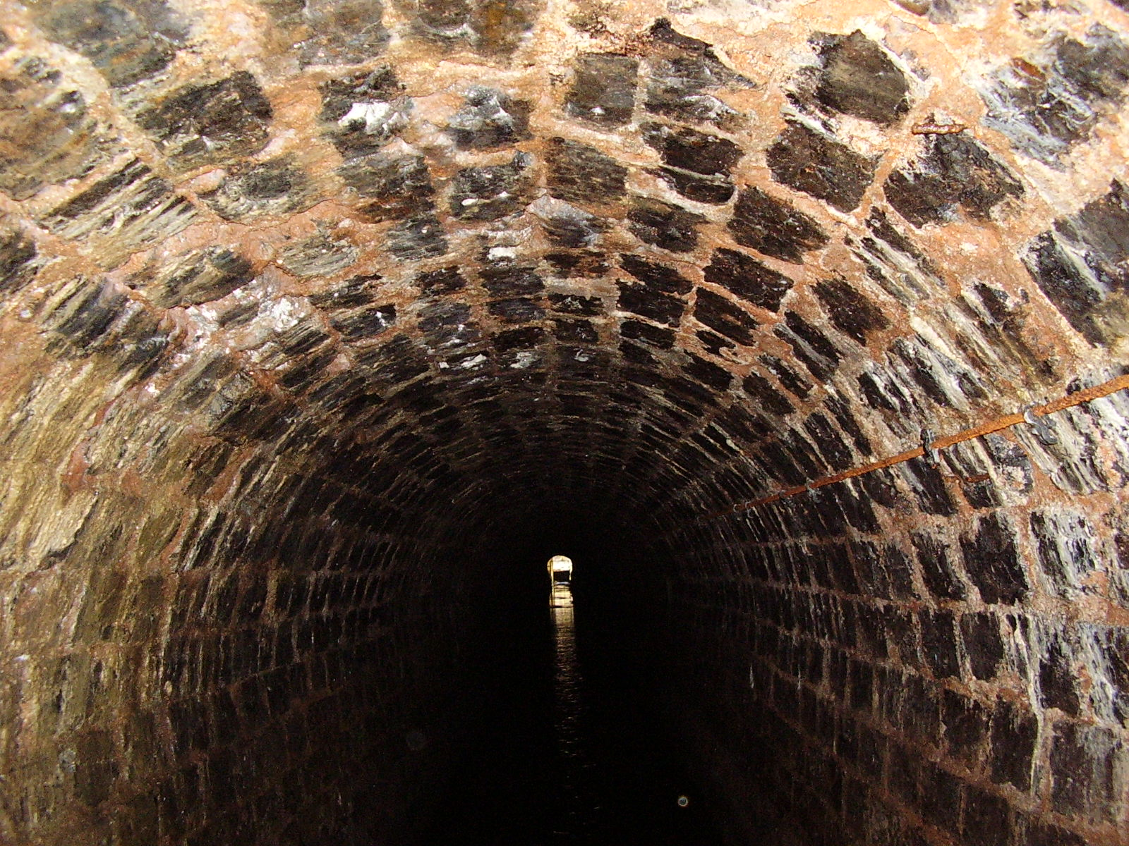 Schlackenstein-Gewölbemauerung im Franz-Auguster Wasserlauf